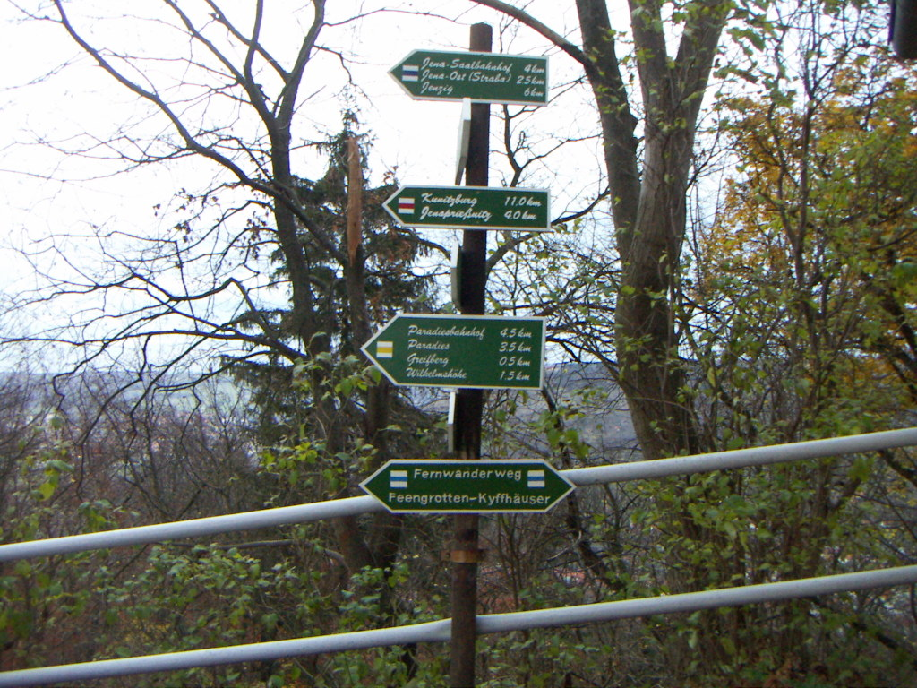 Wegmarkierung des Feengrotten-Kyffhäuser-Fernwanderweges am Fuchsturm